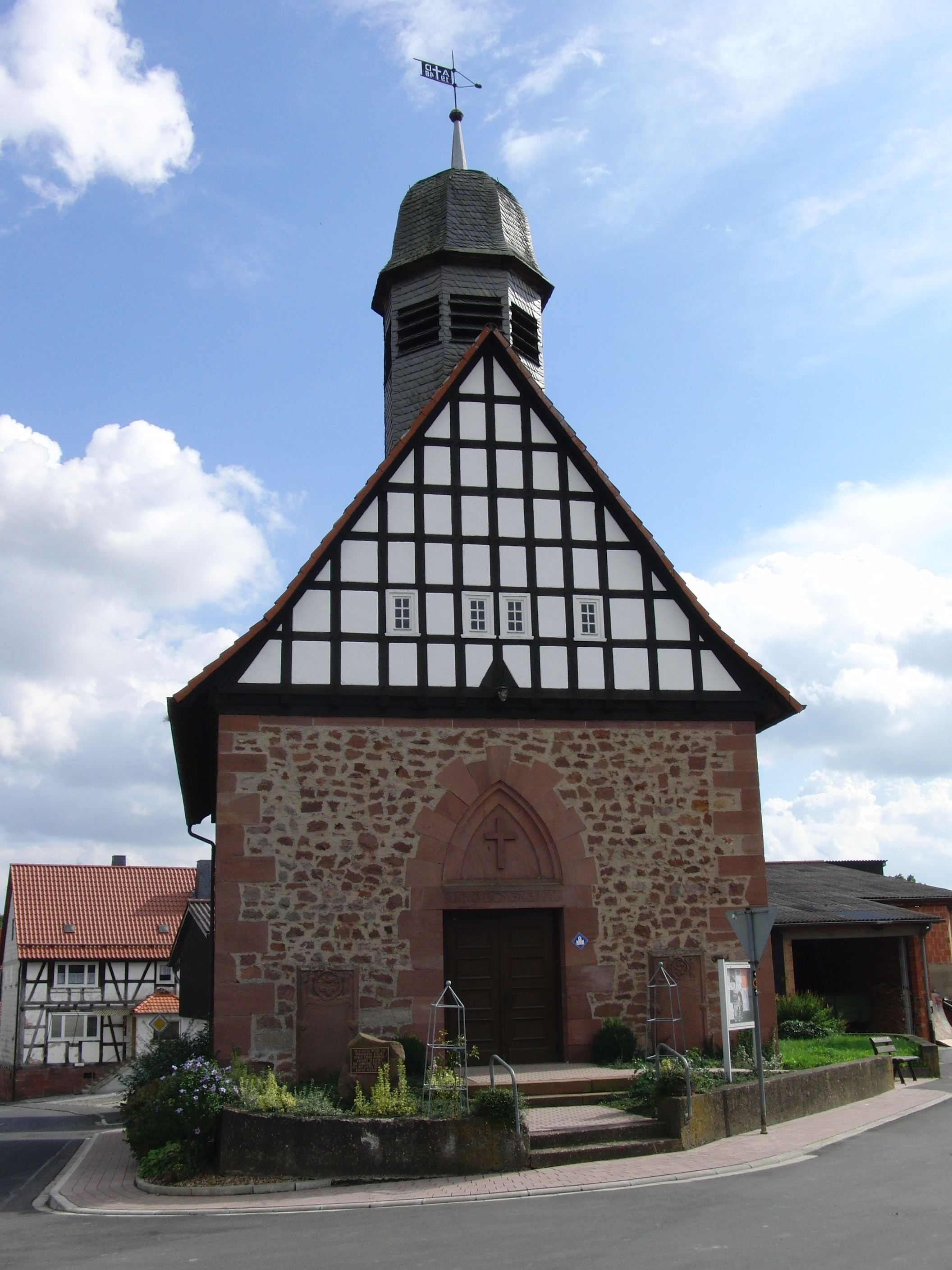 Kirche von Rörshain, Schwalmstadt(Hessen)